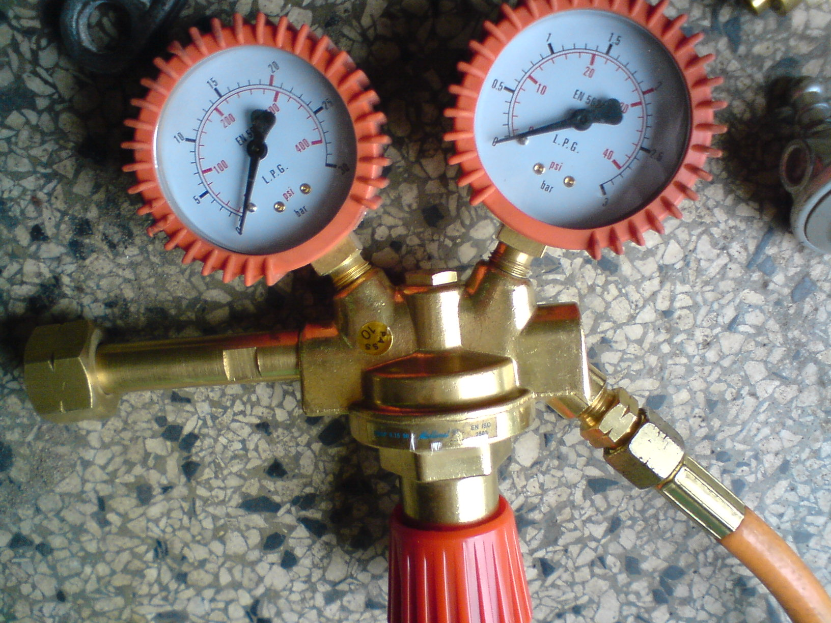 reduktor nastawny do propanu.